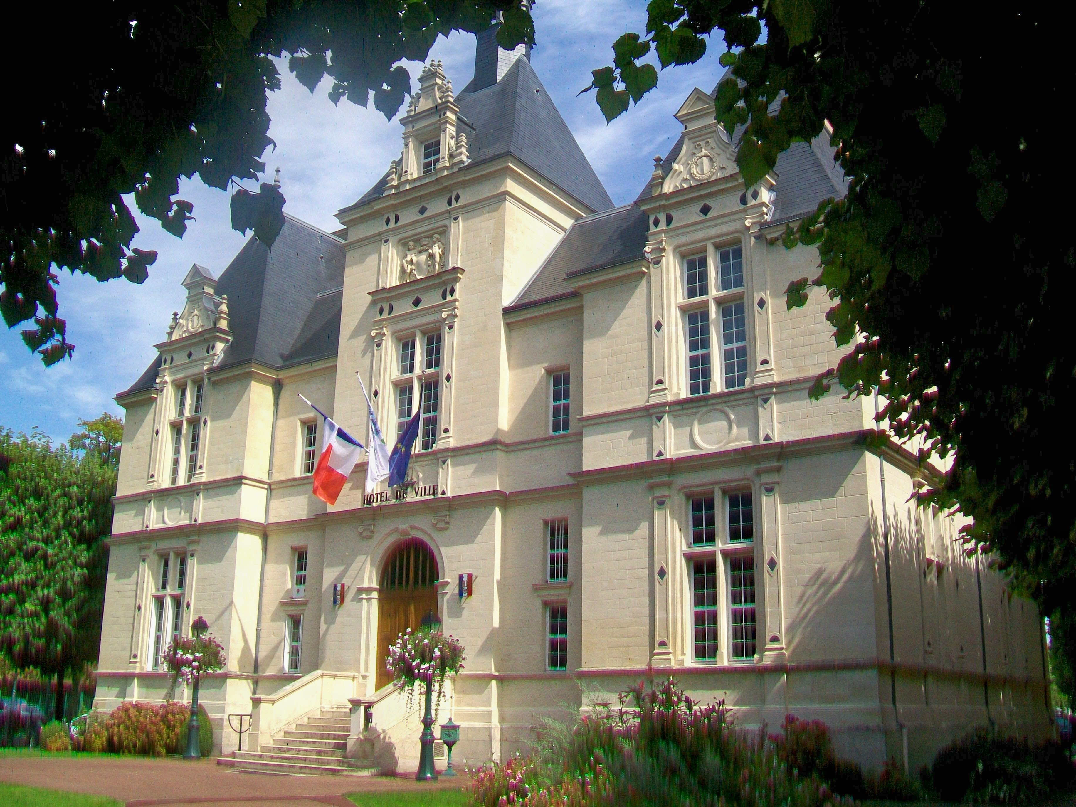 L'hôtel de Ville, façade principale ouest.